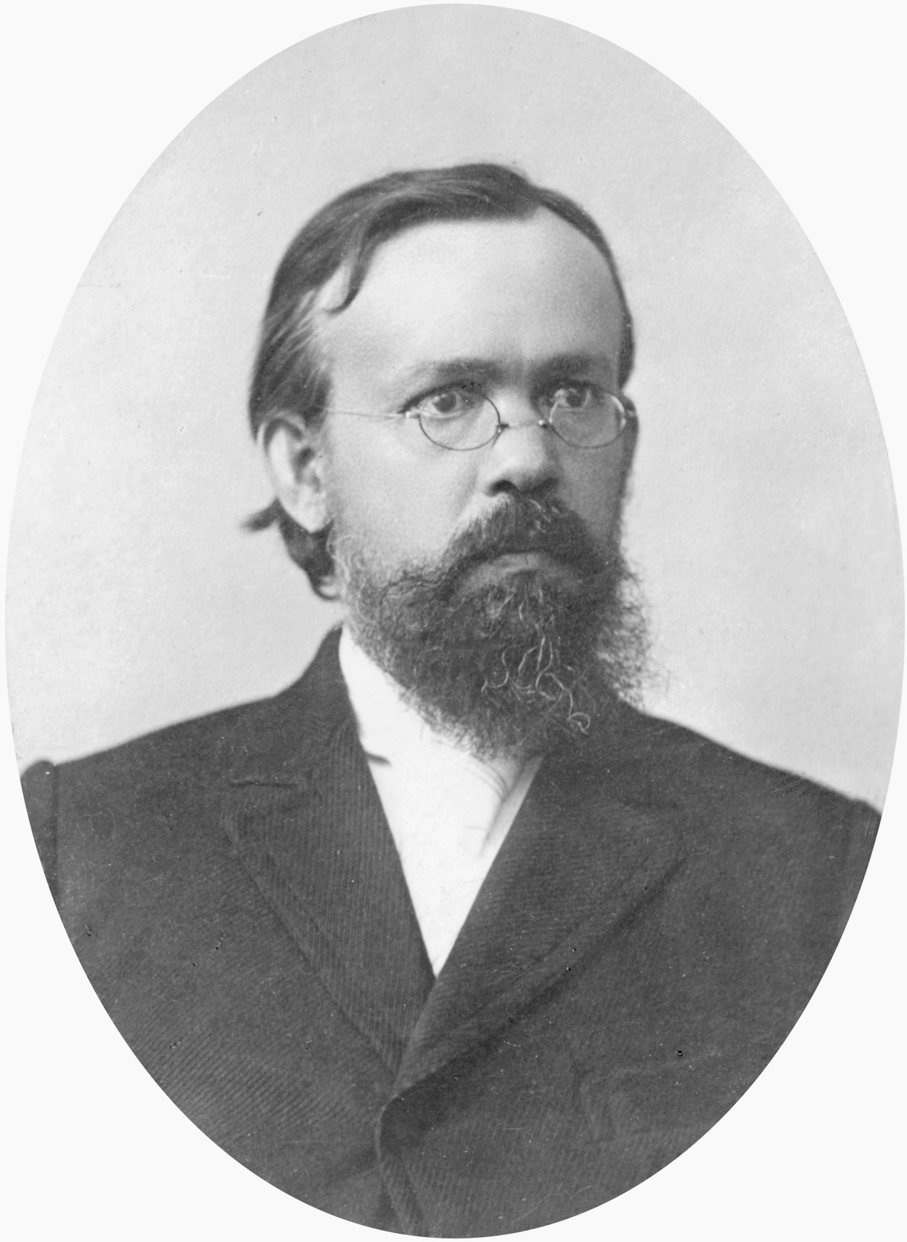 Julius von Kennel